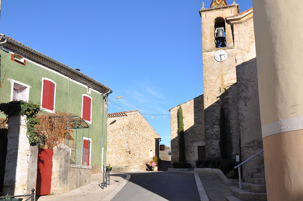 Cruis et son église